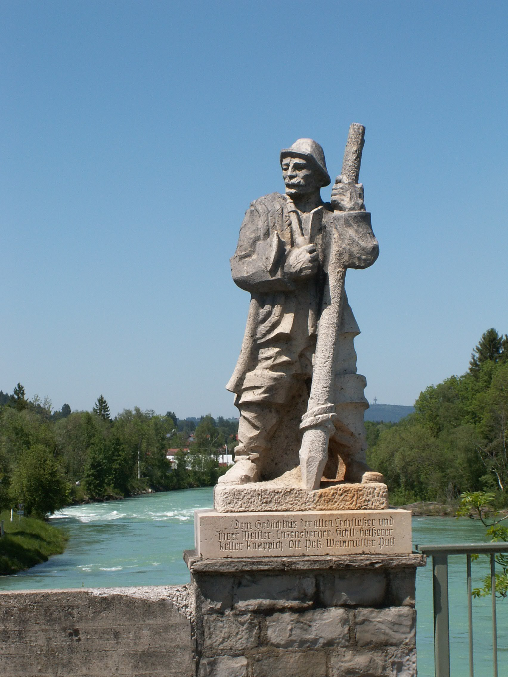 Prem - Flößerdenkmal auf der Lechbrücke